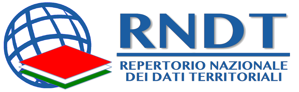 Il logo è stato ideato e realizzato dall'Agenzia per l'Italia Digitale per il progetto RNDT